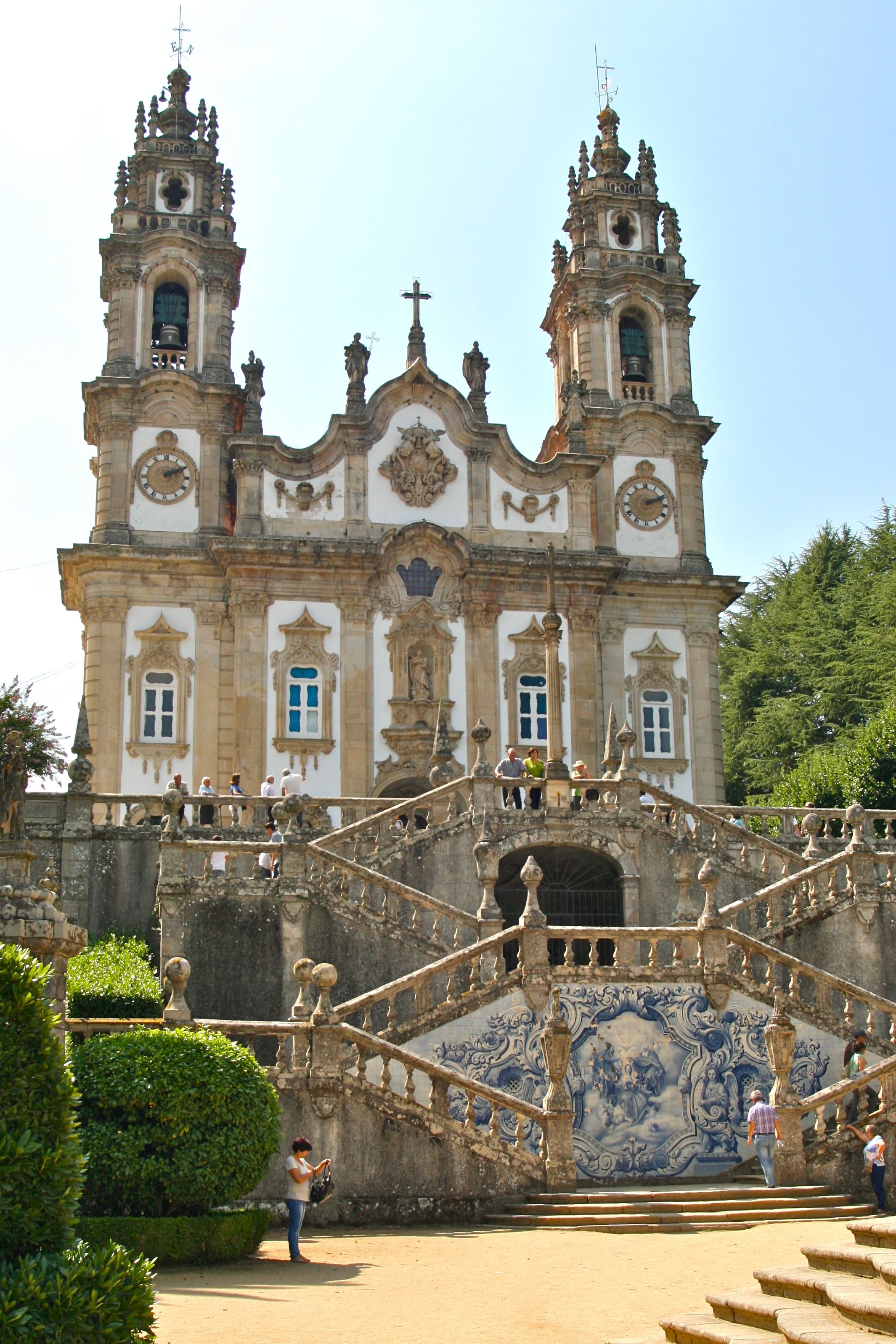 Nossa senhora dos remédios, Lamego